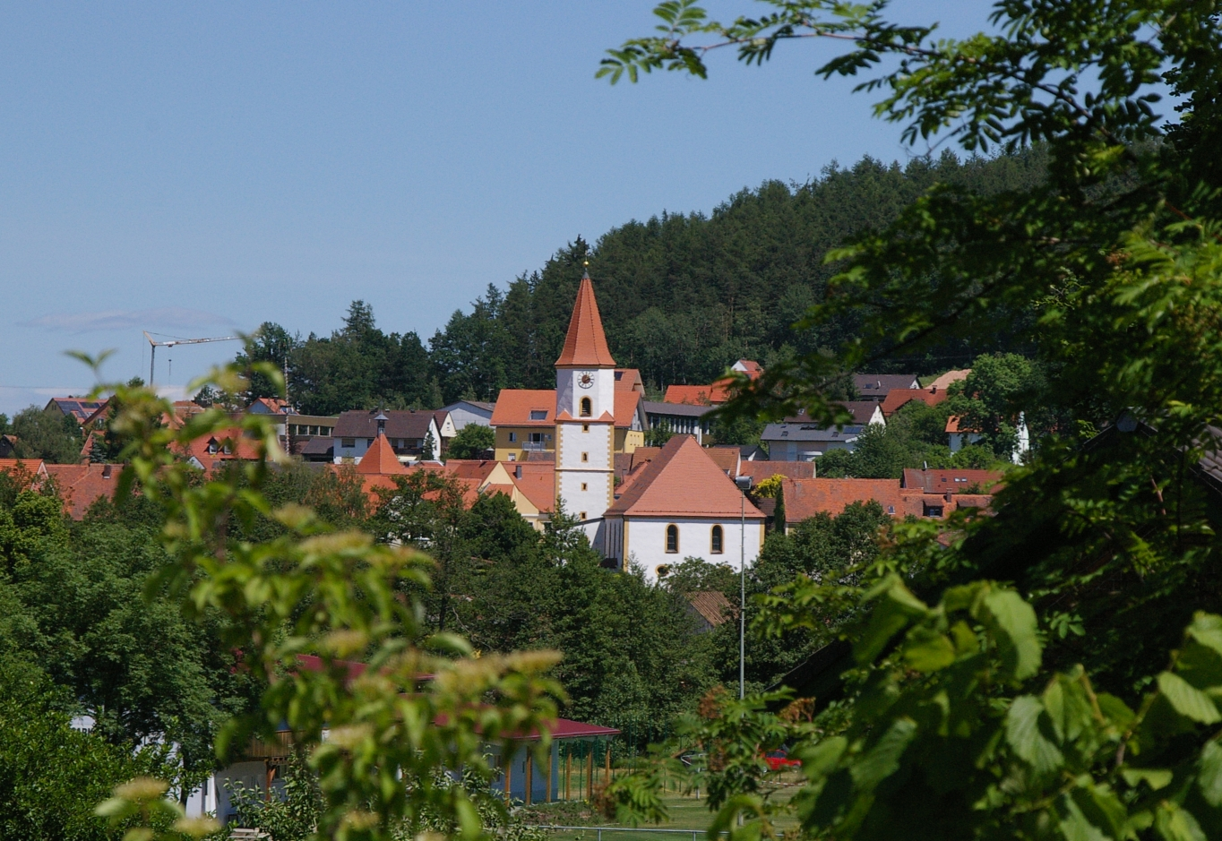 Luhe, Blick von Osten (Ortsteil Am Forst) Bild von mir im Juni 2005 selbst geschossen.